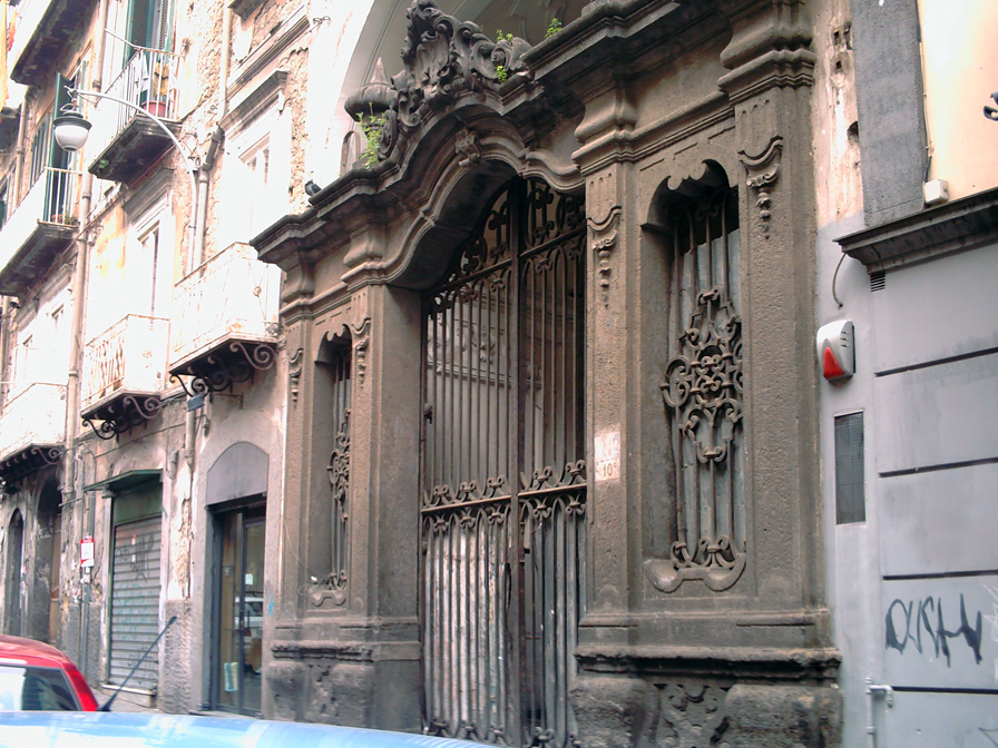 Portale San Francesco delle Monache (Napoli)